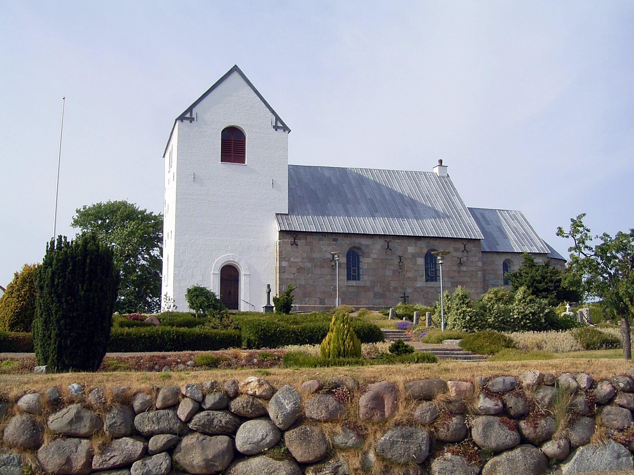 Gudum Kirke, Louisendalvej 14, Gudum 9280 Storvorde, Aalborg Kommune, Denmark